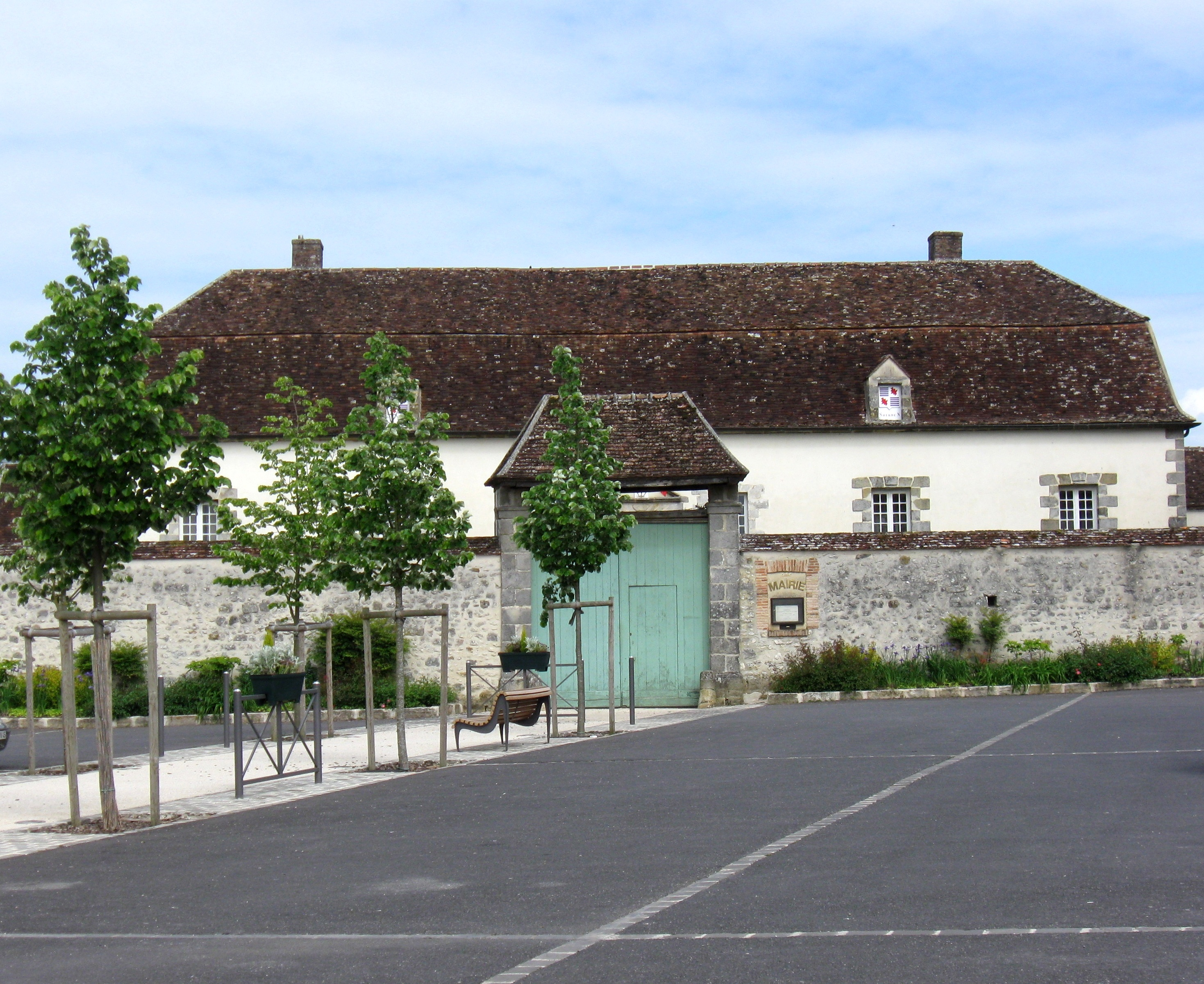 Mairie de Sourdun. (Seine-et-Marne, région Île-de-France).